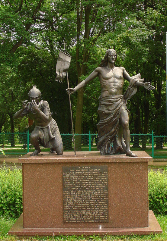 Częstochowa, zespół klasztorny paulinów na Jasnej Górze